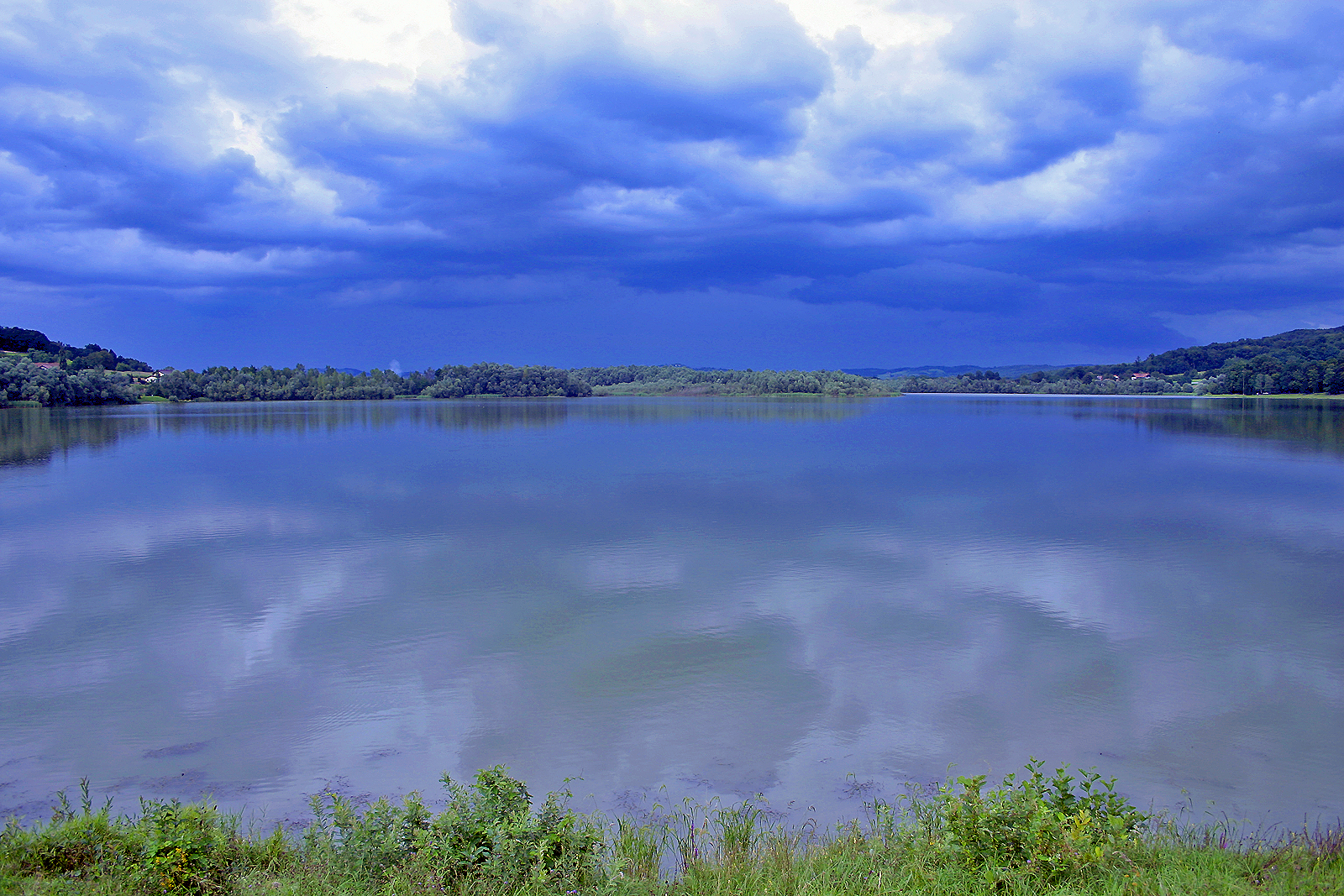 Ledava lake Krašči,Ledavsko jezero Krašči